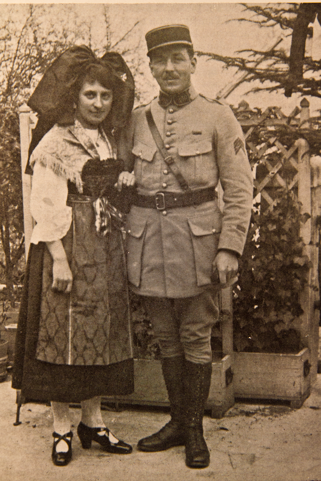 André Bas et Marthe Kuentz, le jour de leurs fiançaillesà Pacques 1919. L'officier français libérateur et la jeune alsacienne.